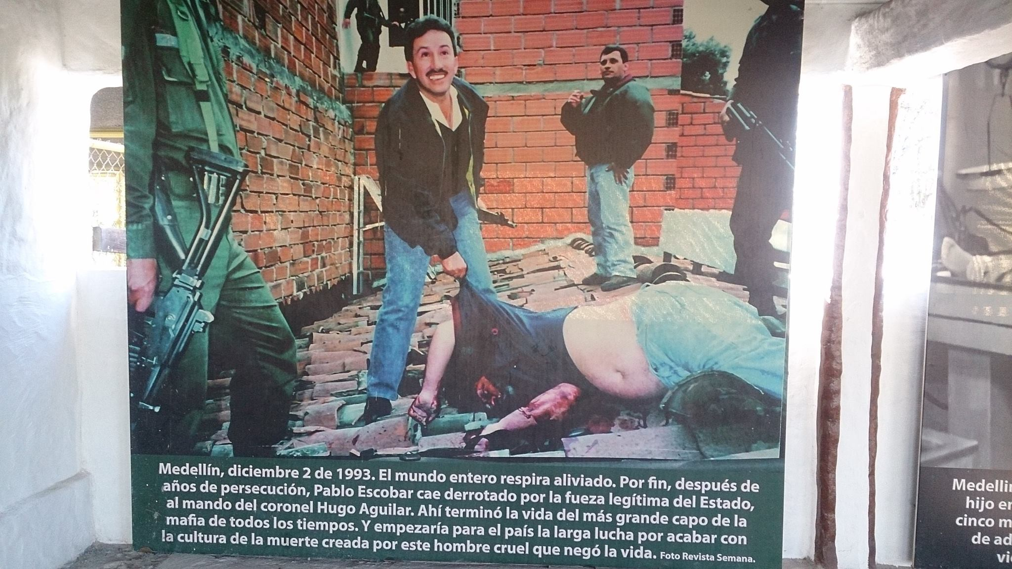 Esta fotografía fue tomada en el municipio colombiano con código 05591.